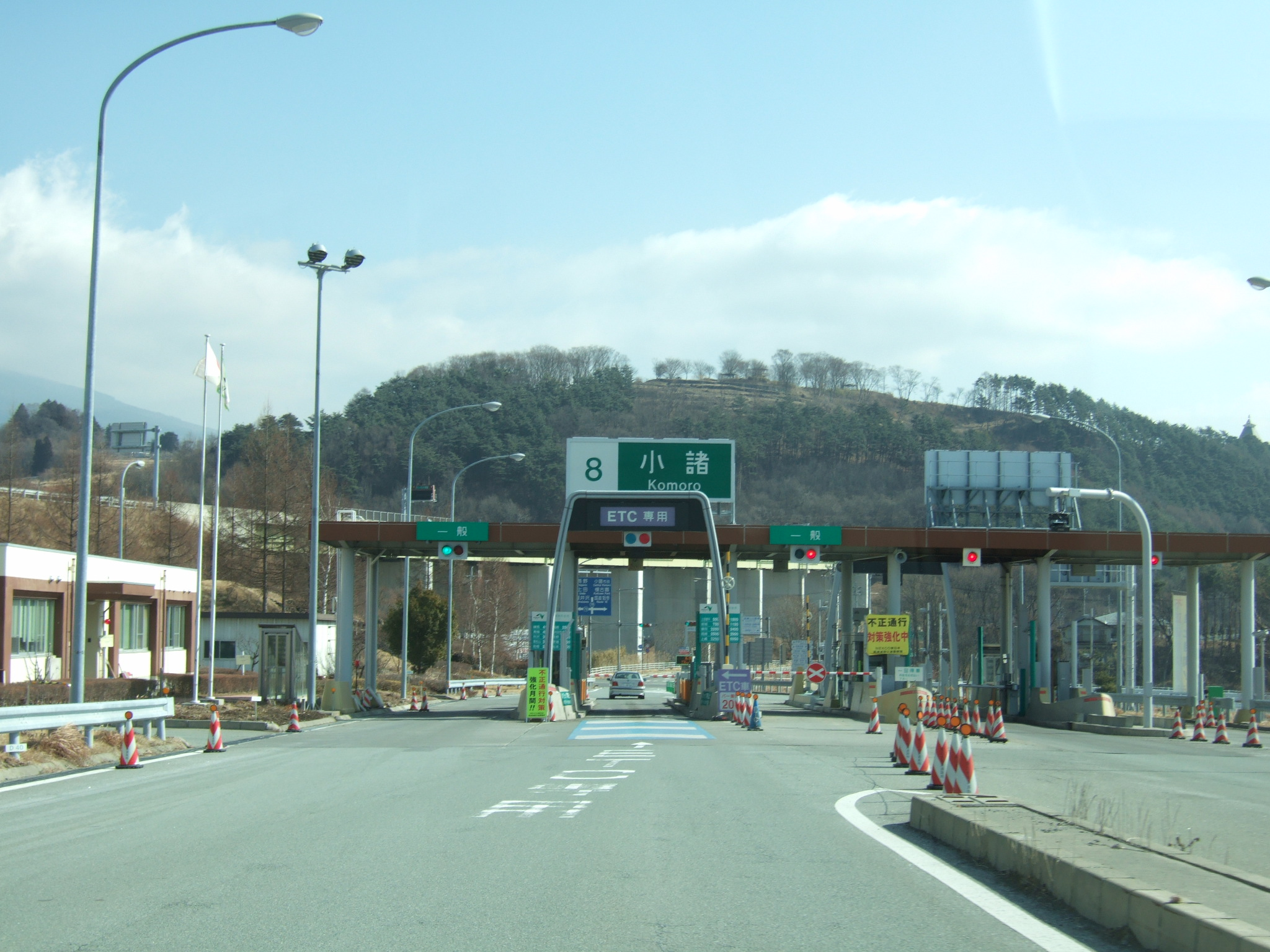 小諸IC